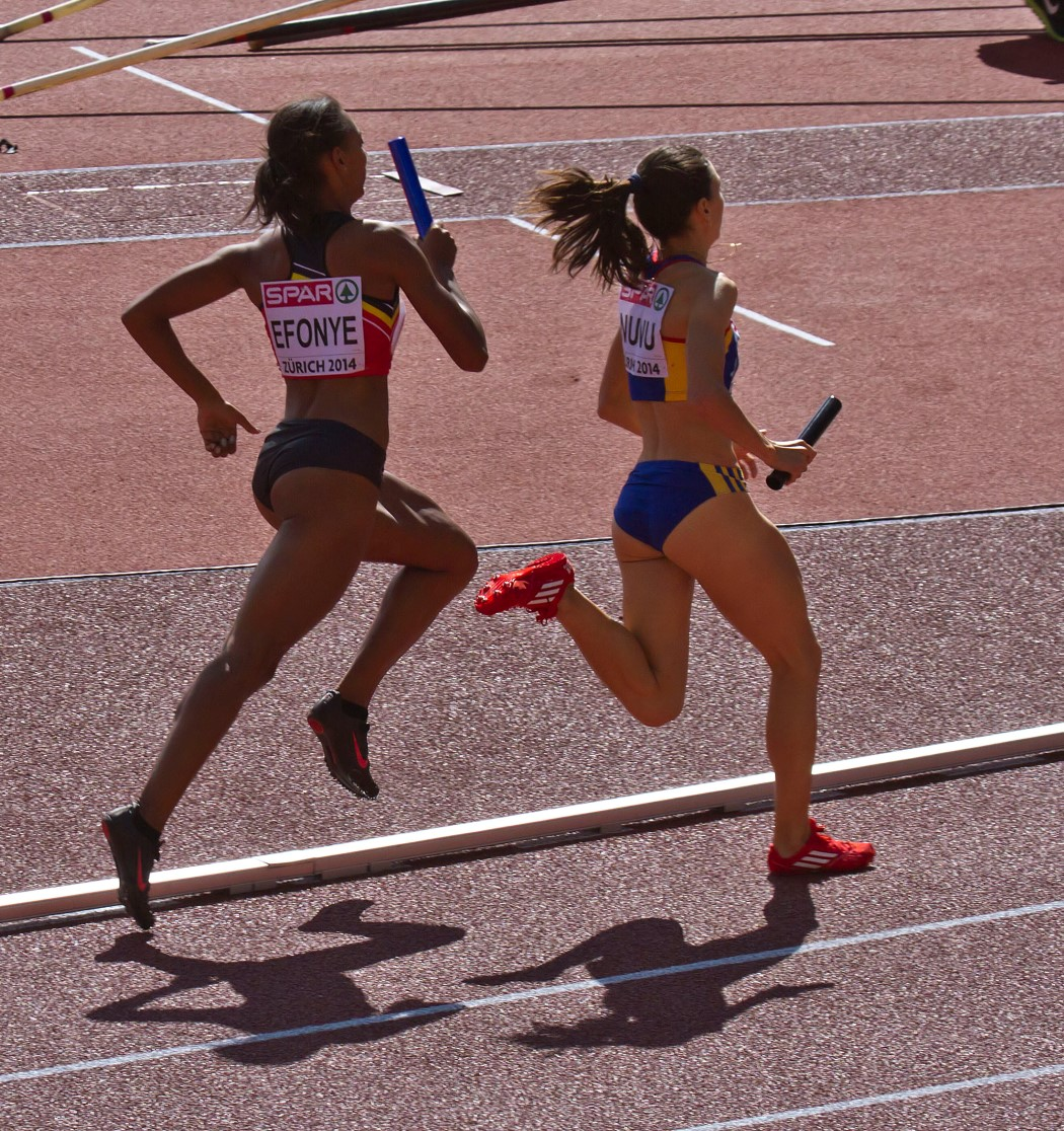 990284 4X400m efonye